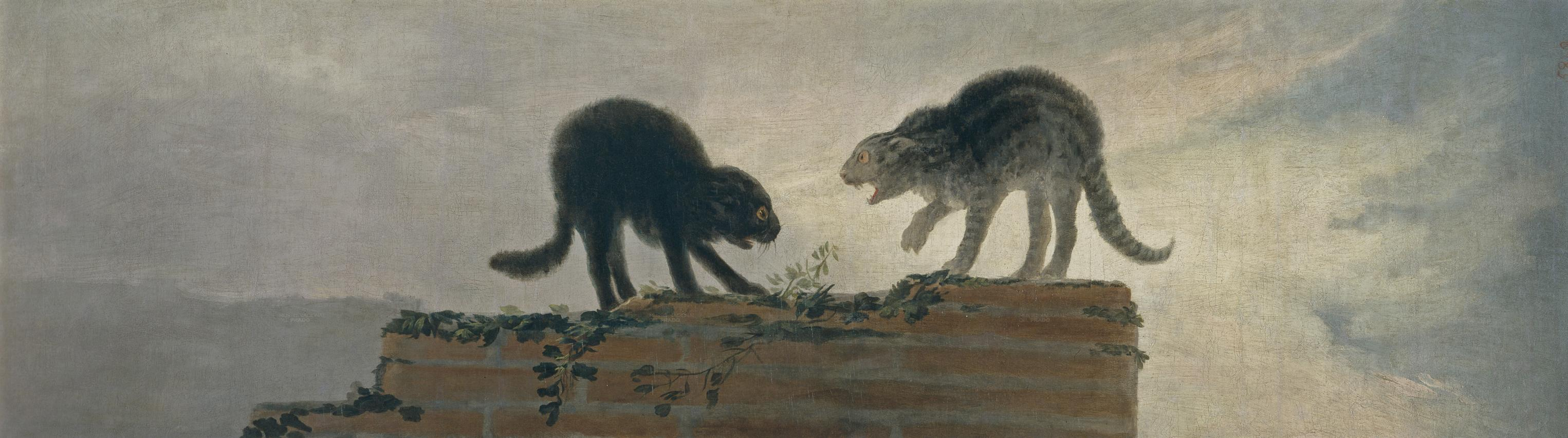 Cartones para tapices.